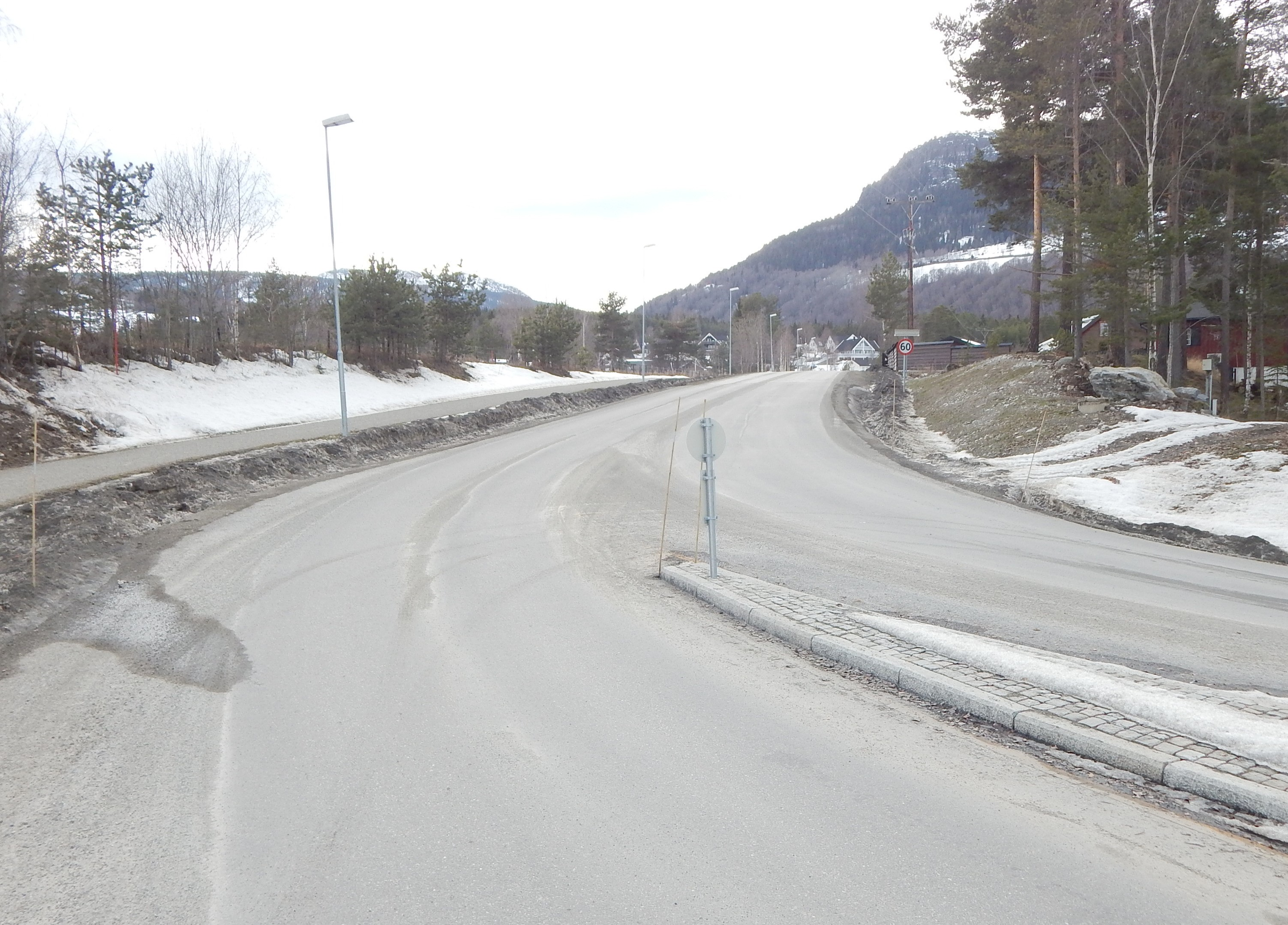 Nørdre Feforvegen (fylkesvei 422) sett fra Baksidevegen (primær fylkesvei 256)